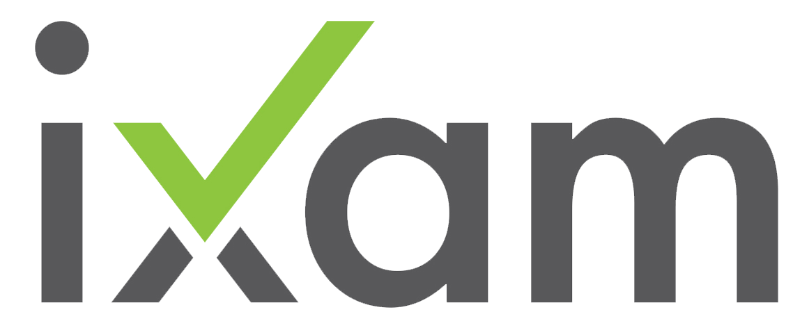 iXam nyelvvizsga logo